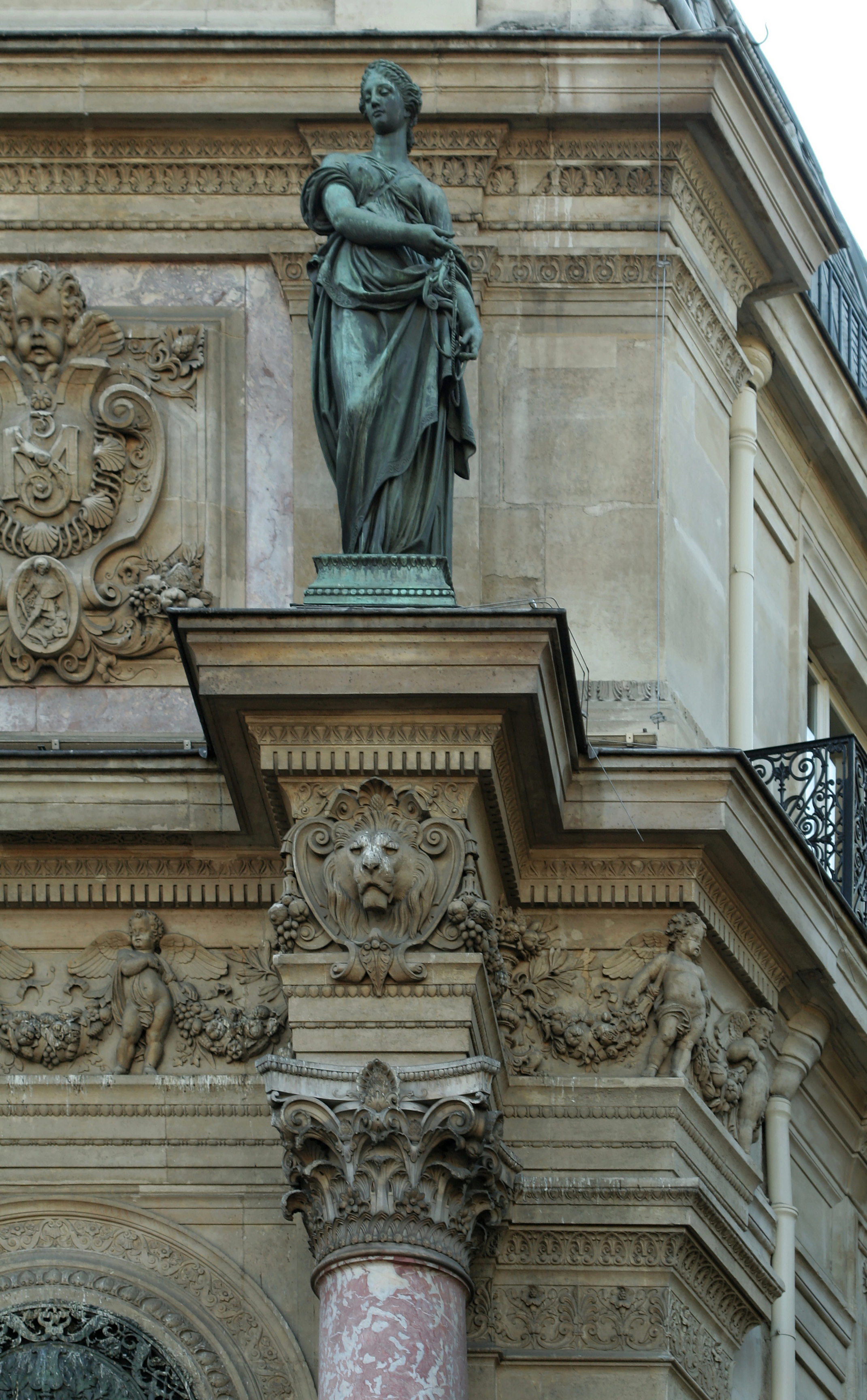 Détail de la fontaine Saint-Michel (Paris).